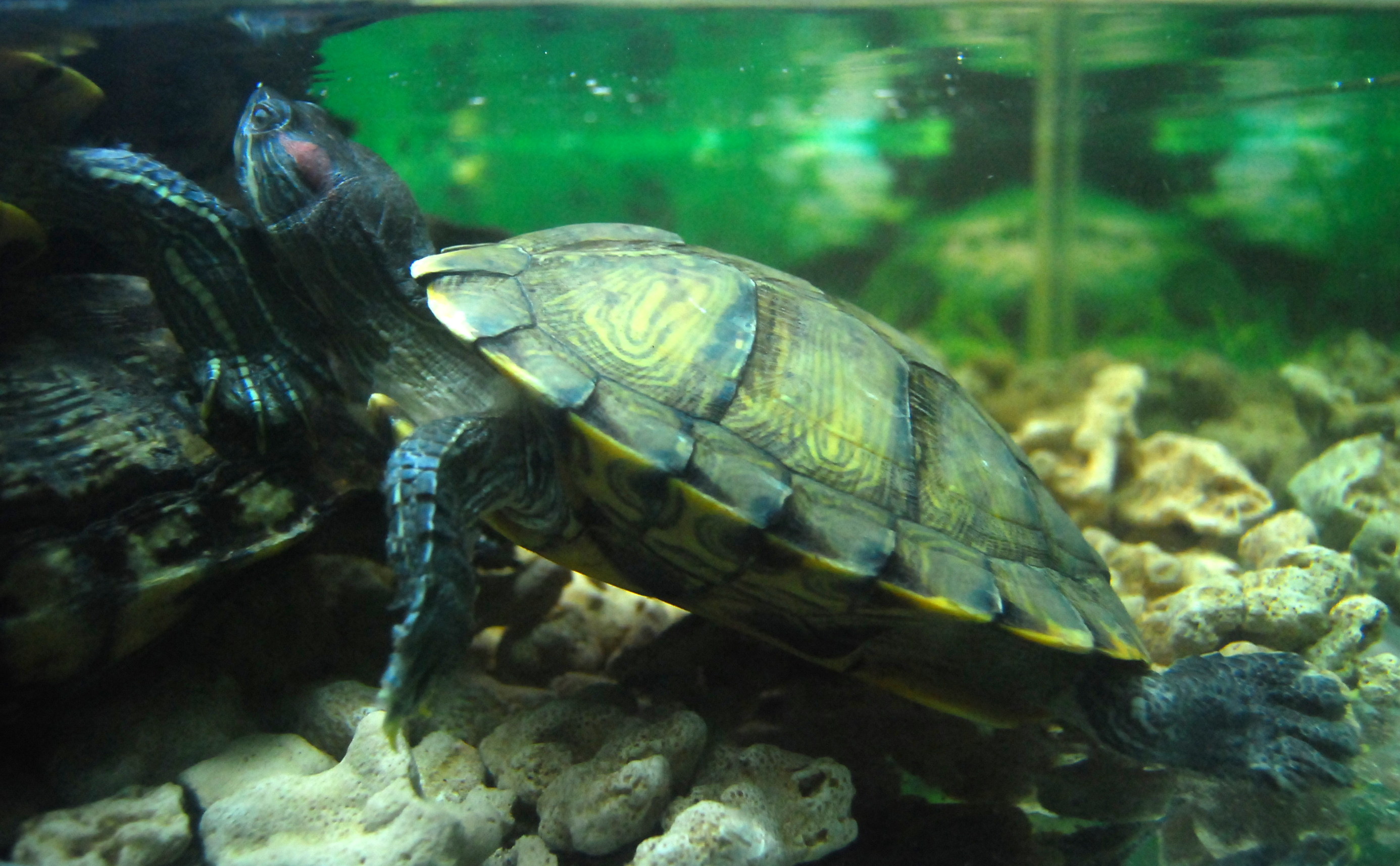 北京动物园的红耳龟